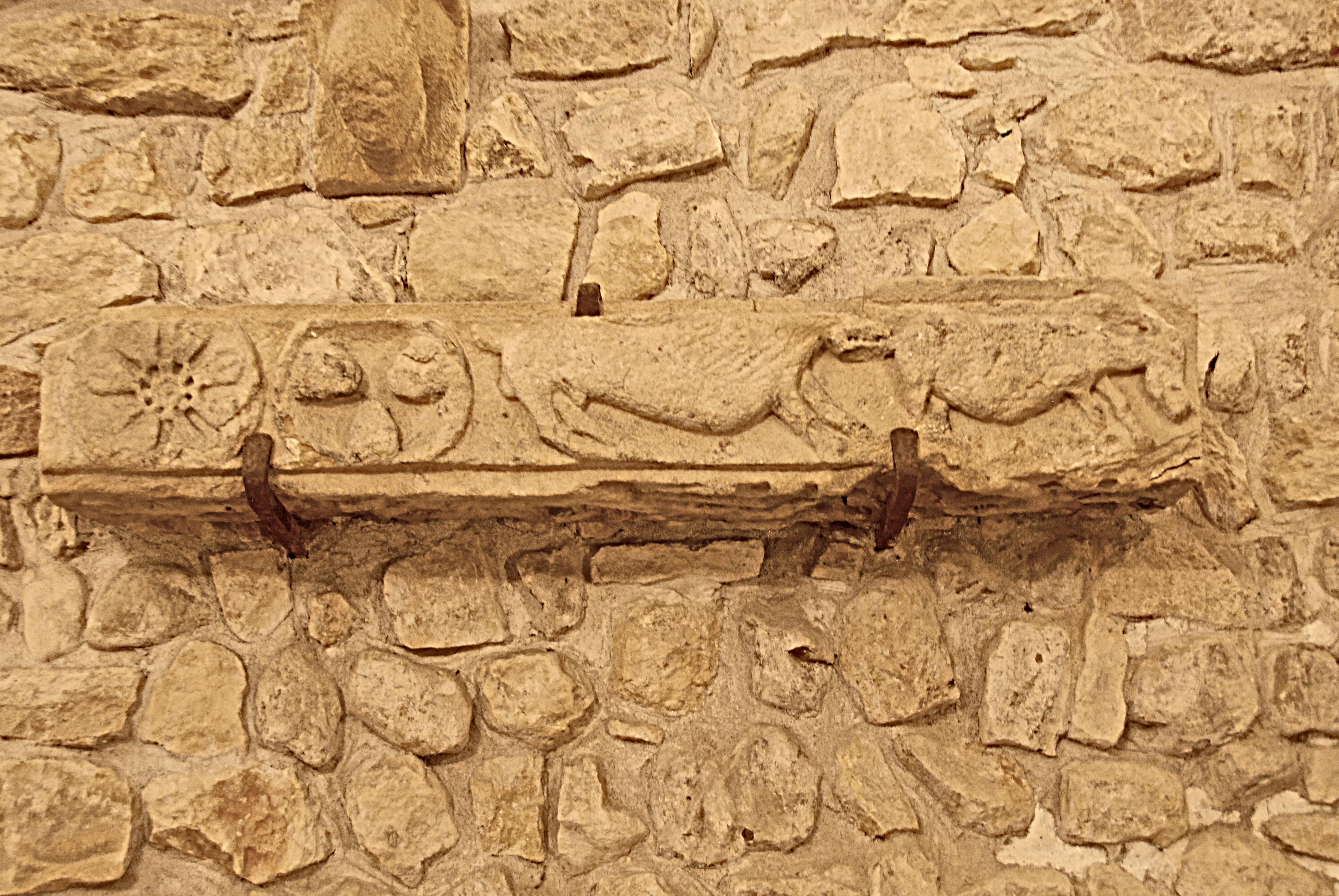 Lapidarium, Relief mit Stieren